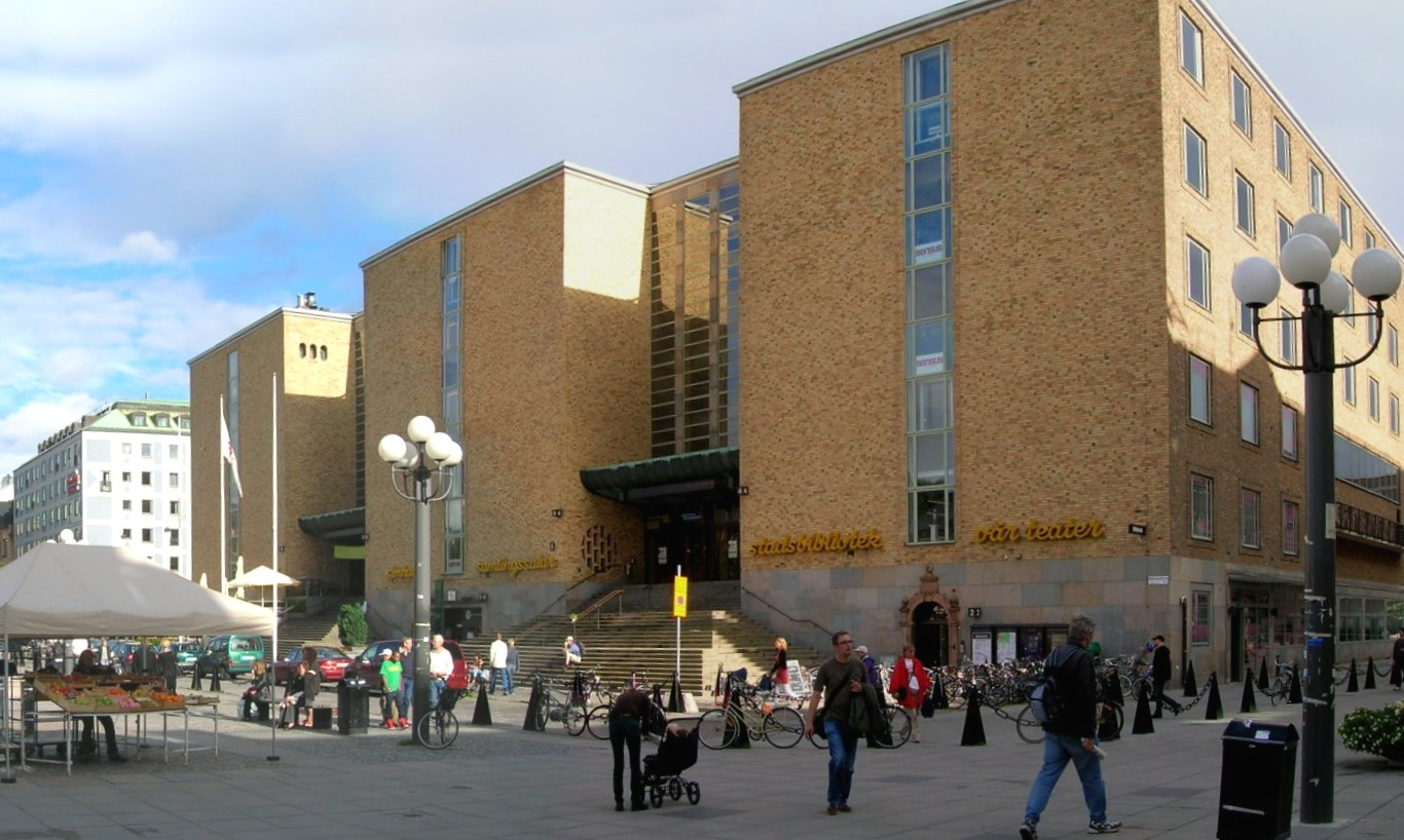 Forsgrenska Medborgarhuset at Medborgarplatsen, Södermalm, Stockholm.